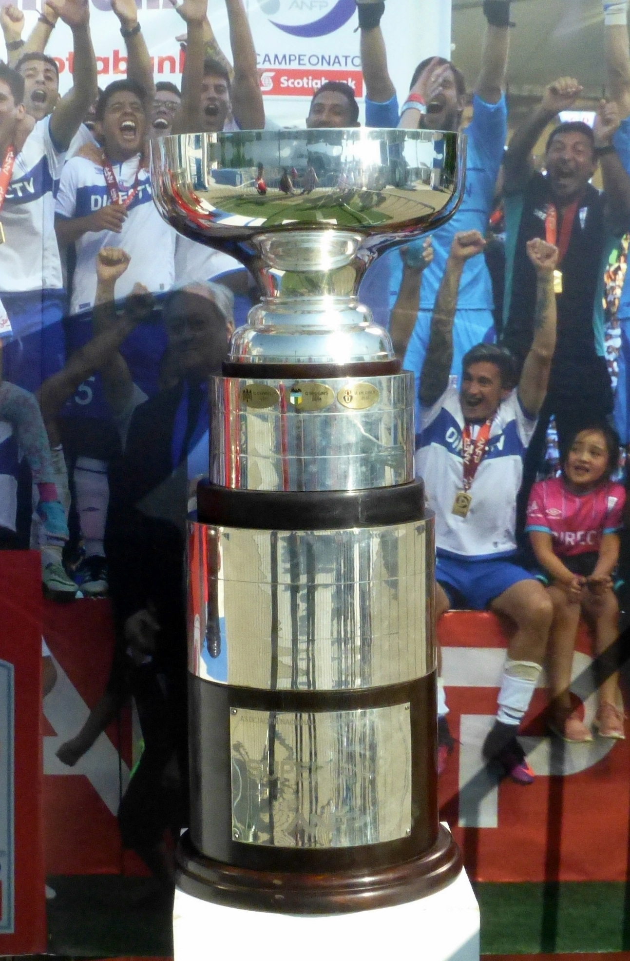 Supercopa de Chile exhibición en San Carlos de Apoquindo 2016